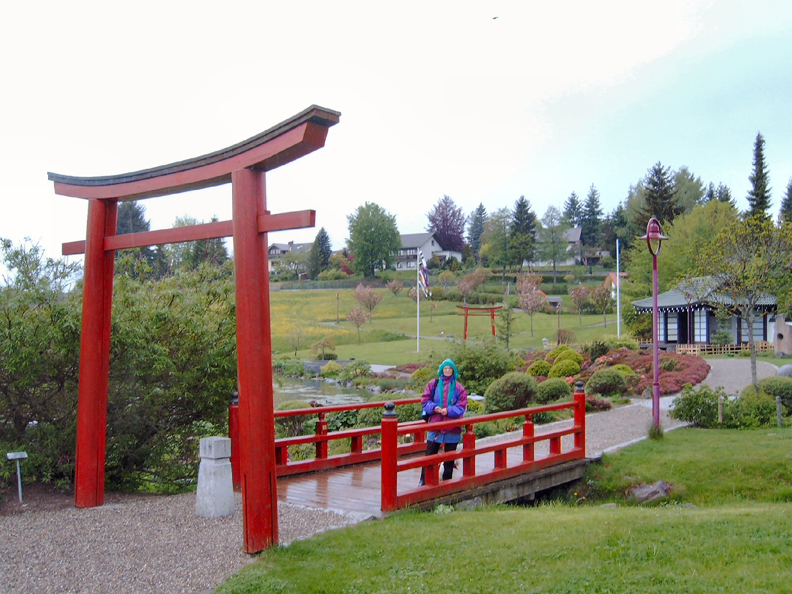 Japanischer Garten in Bonndorf. Selbst fotografiert am 21.05.05: GNU-FDL Das Einverständnis der abgebildeten Person liegt vor.